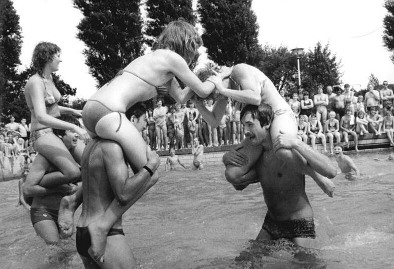 ADN-ZB Uhlemann 6.8.85 Berlin: Jugend- Rund 1.100 Studenten aus den Bezirken Halle und Leipzig absolvieren gegenwärtig ihr "drittes Semester" in Betrieben und auf Baustellen der Hauptstadt. Untergebracht sind sie im Zeltlager "IX. Parteitag der SED" in der Lichtenberger Herzbergstraße. Beim Sport- und Neptunfest im benachbarten BVB-Stadion herrscht ausgelassene Stimmung. - siehe auch 1985-0806-2 und 3 N